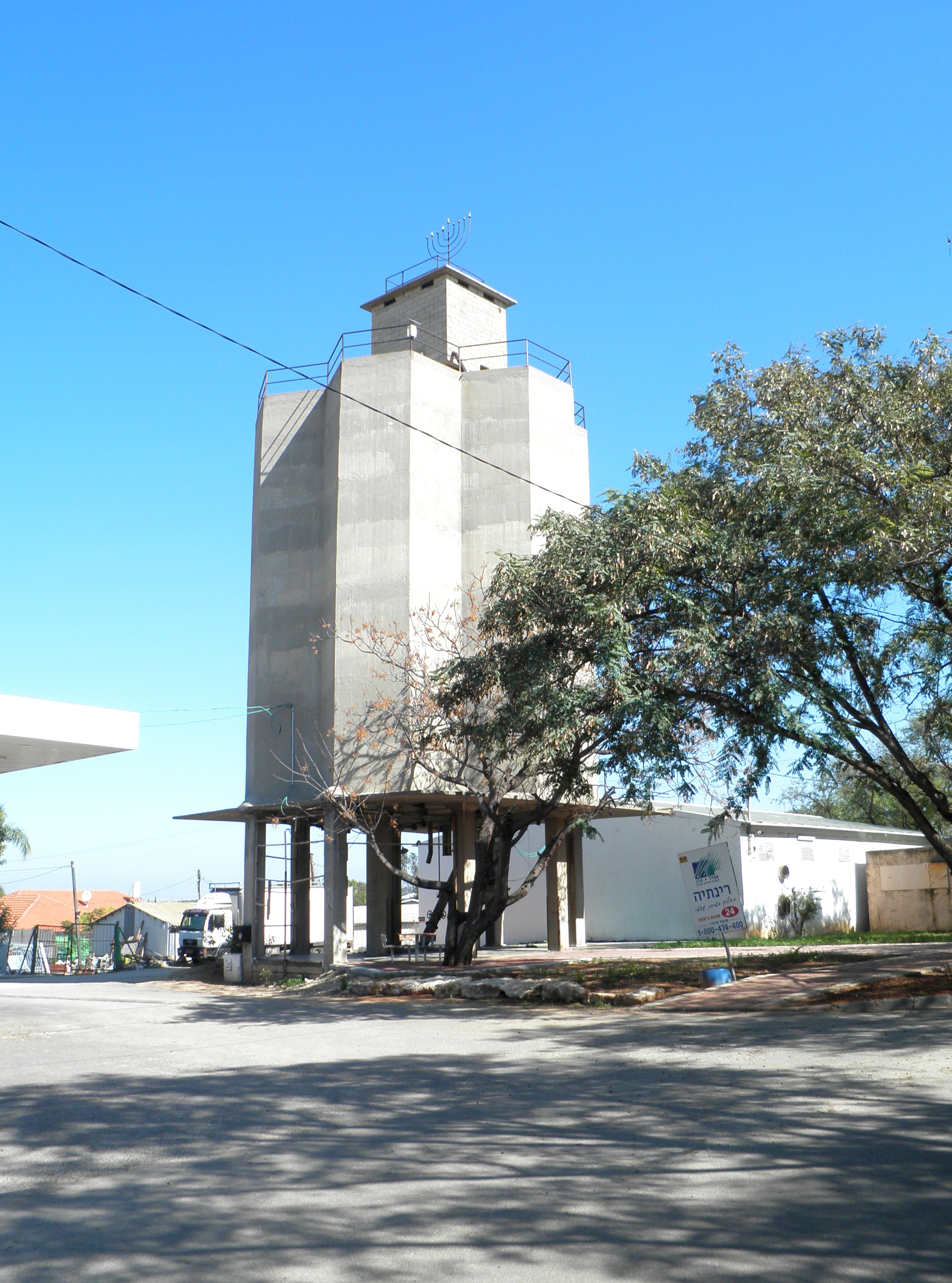 Moshav Rinatya סילו